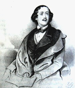 Leopold Juda Porges von Portheim (1785 - 1869), Rakouský a český továrník židovského původu.